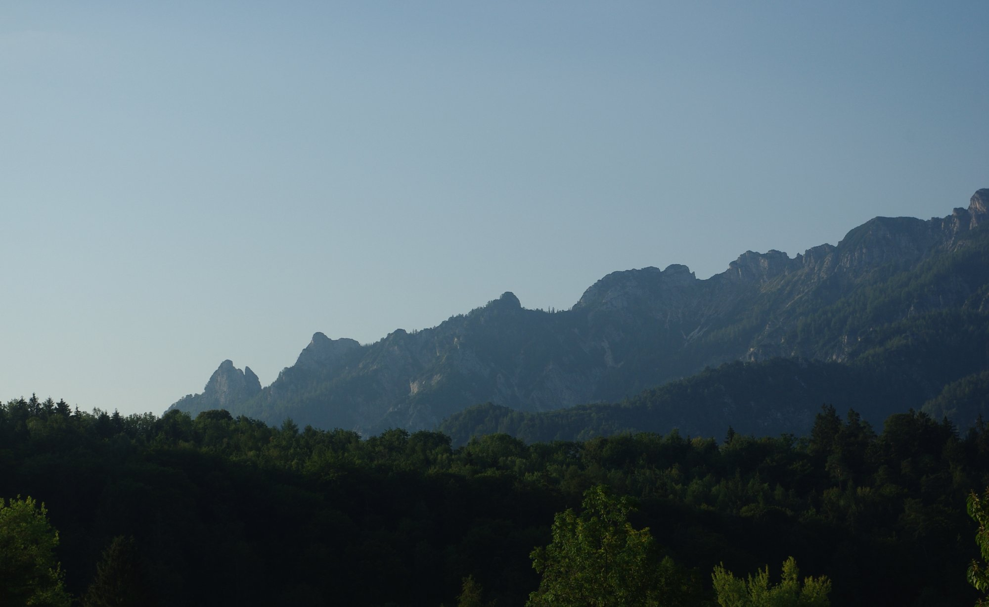 Die Rotofentürme (Schlafende Hexe) von Bad Reichenhall aus gesehen. Im Vordergrund das Kirchholz